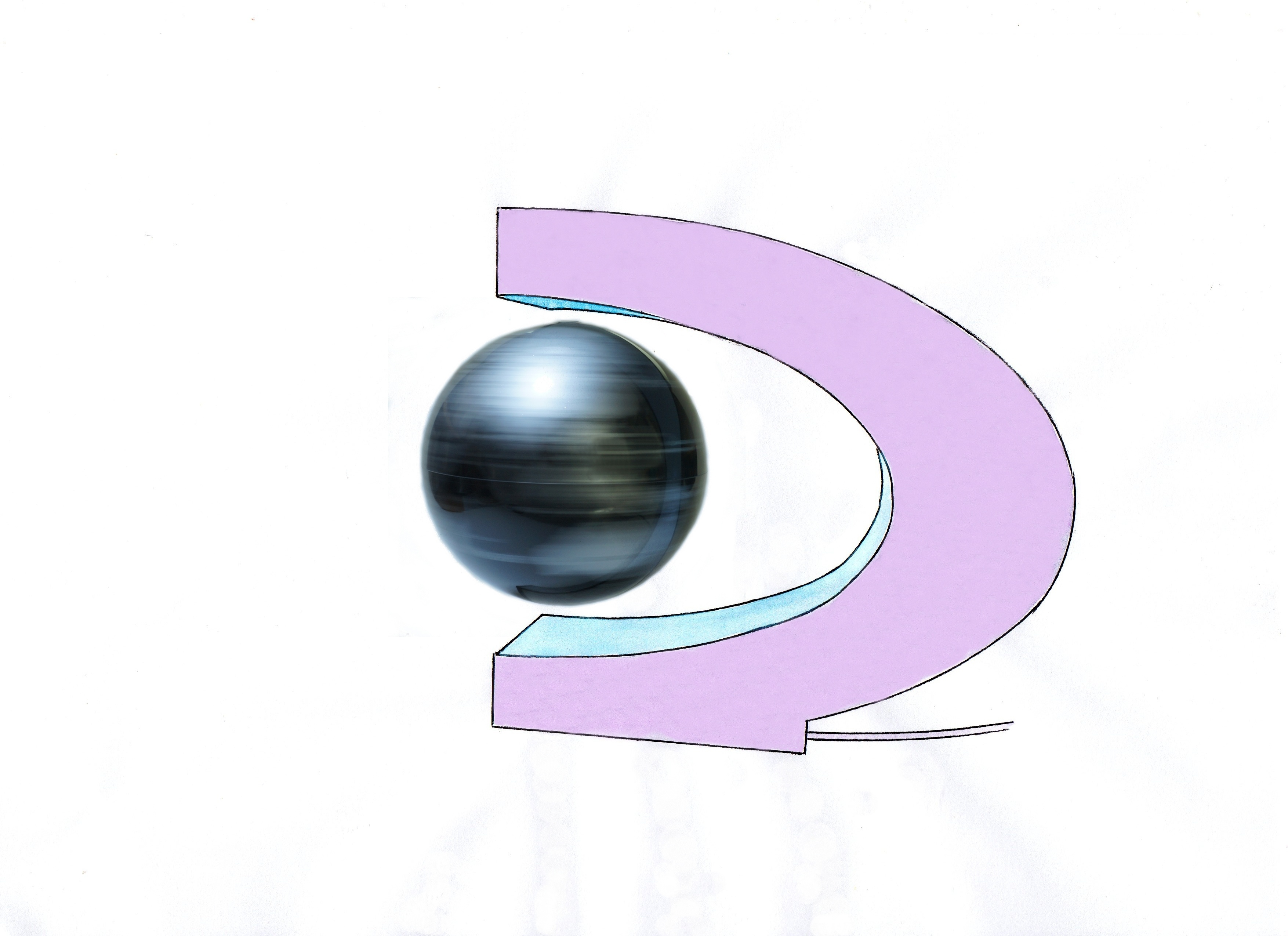 Vznášející se glóbus